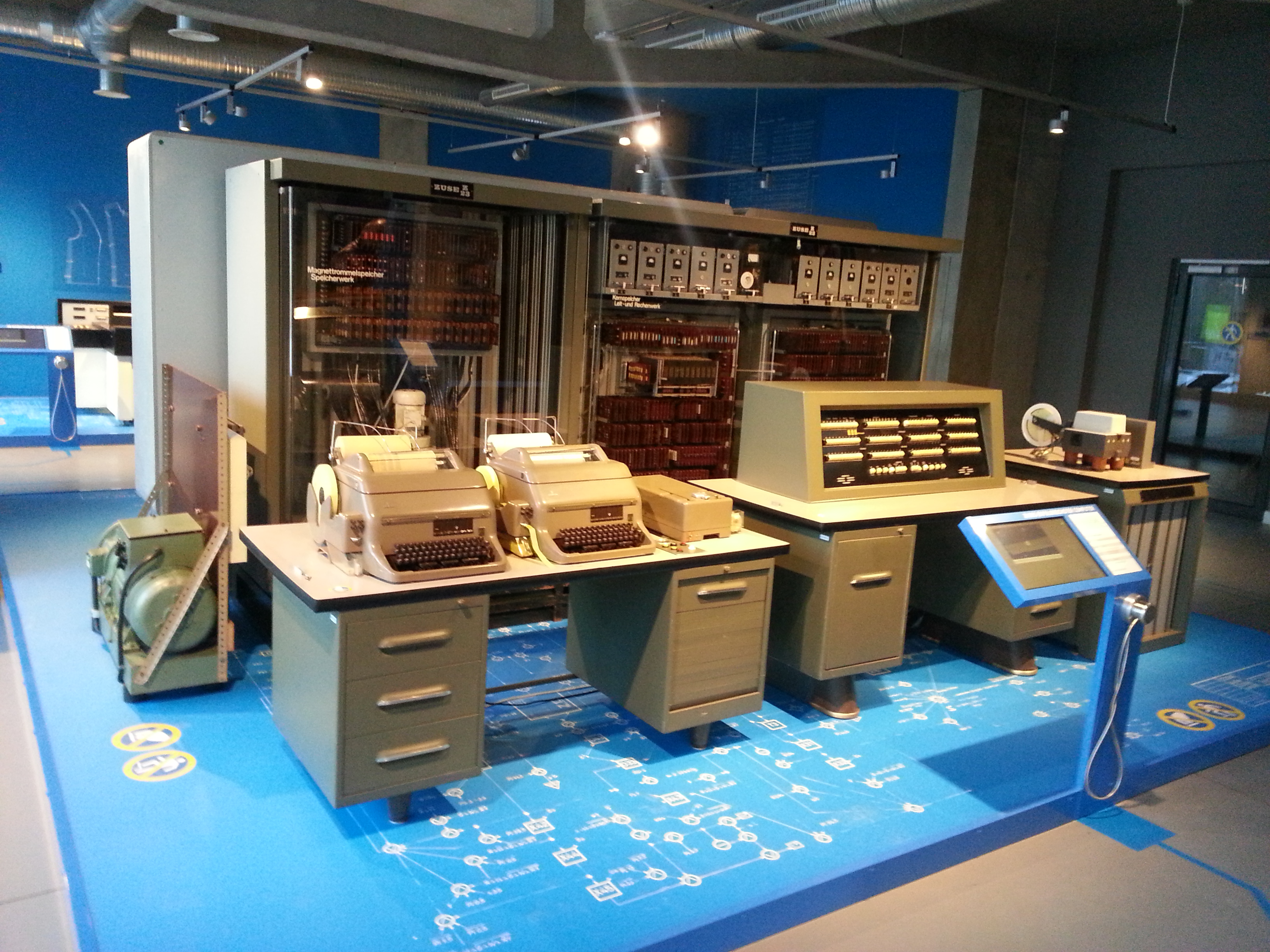 Der Zuse Z23 Computer in der Ausstellung des ZCOM.